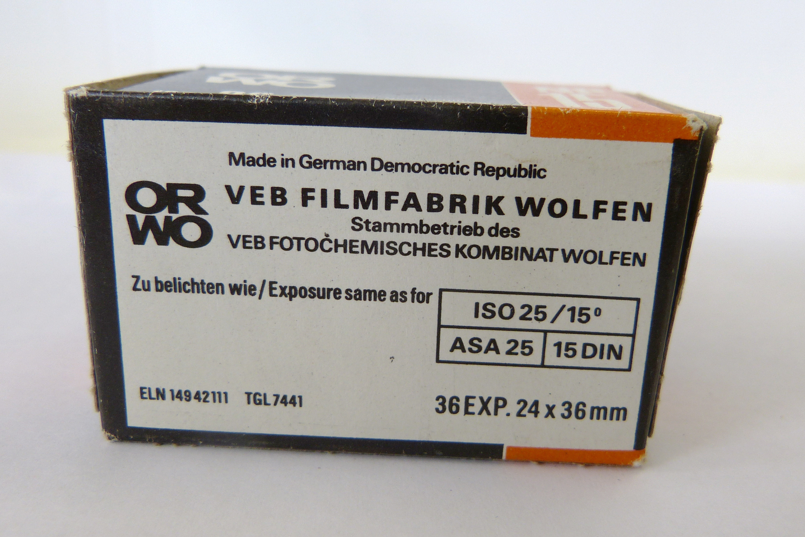 VEB Filmfabrik Wolfen - VEB Fotochemisches Kombinat Wolfen - NP 15 135-36 ISO 25/15 RO WO - 36exp. 24 x 36 mm